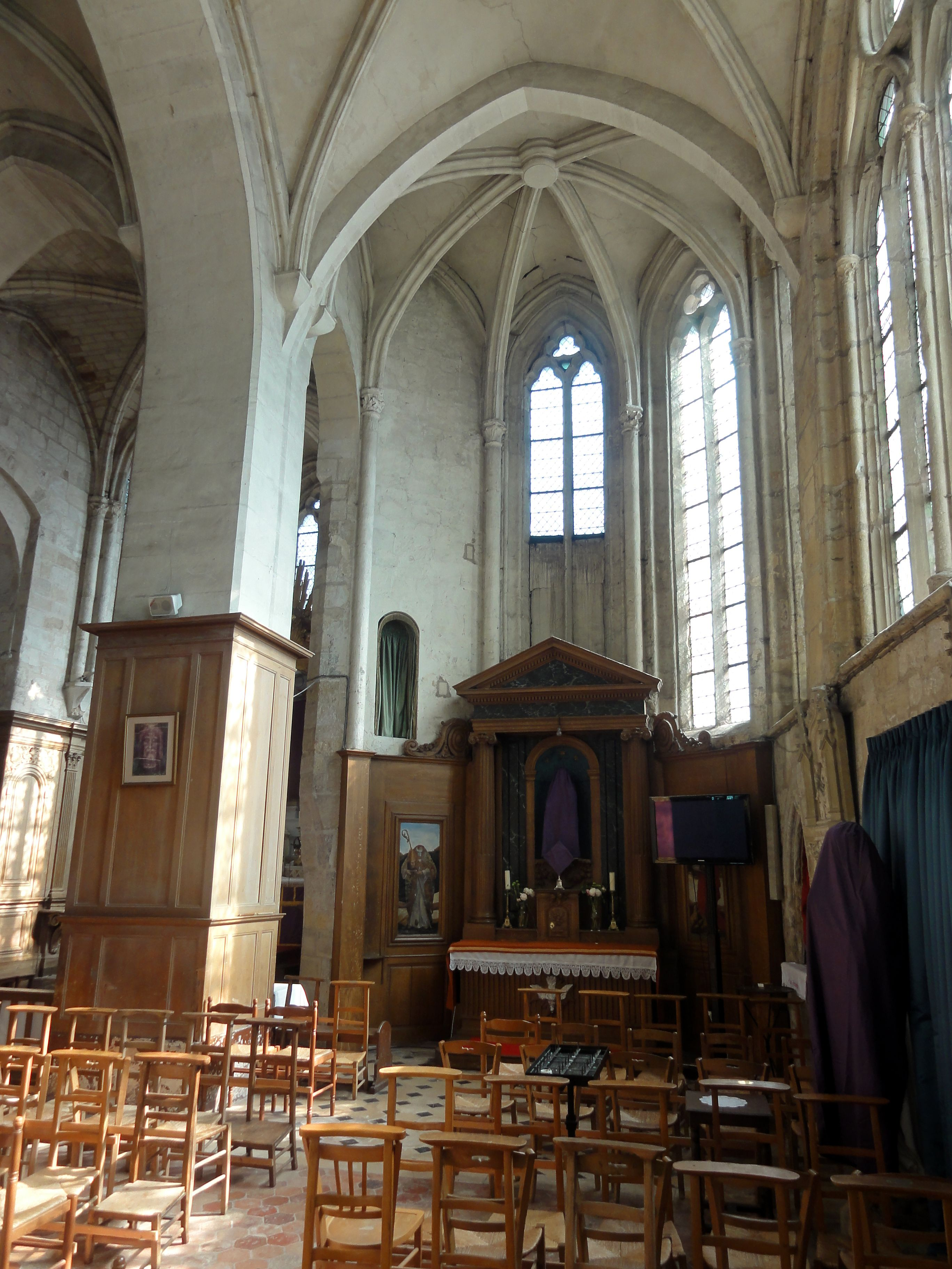 Collatéral sud, vue vers l'est.